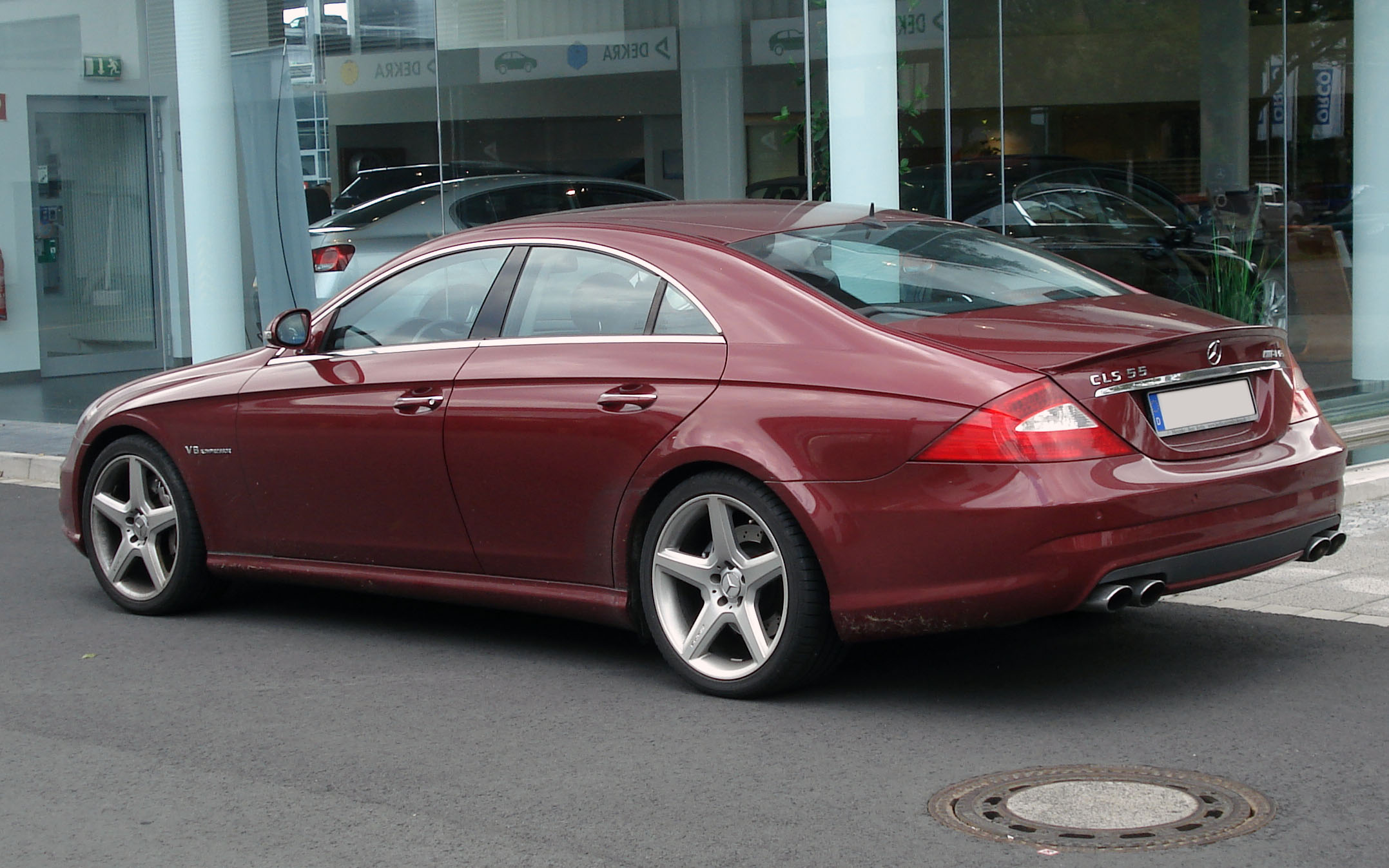 Mercedes-Benz CLS 55 AMG